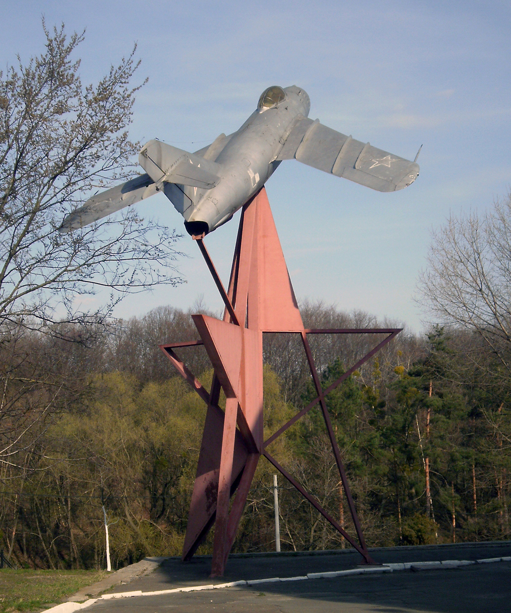 МиГ-17 возле школы № 5 на Бусовой горе в Киеве